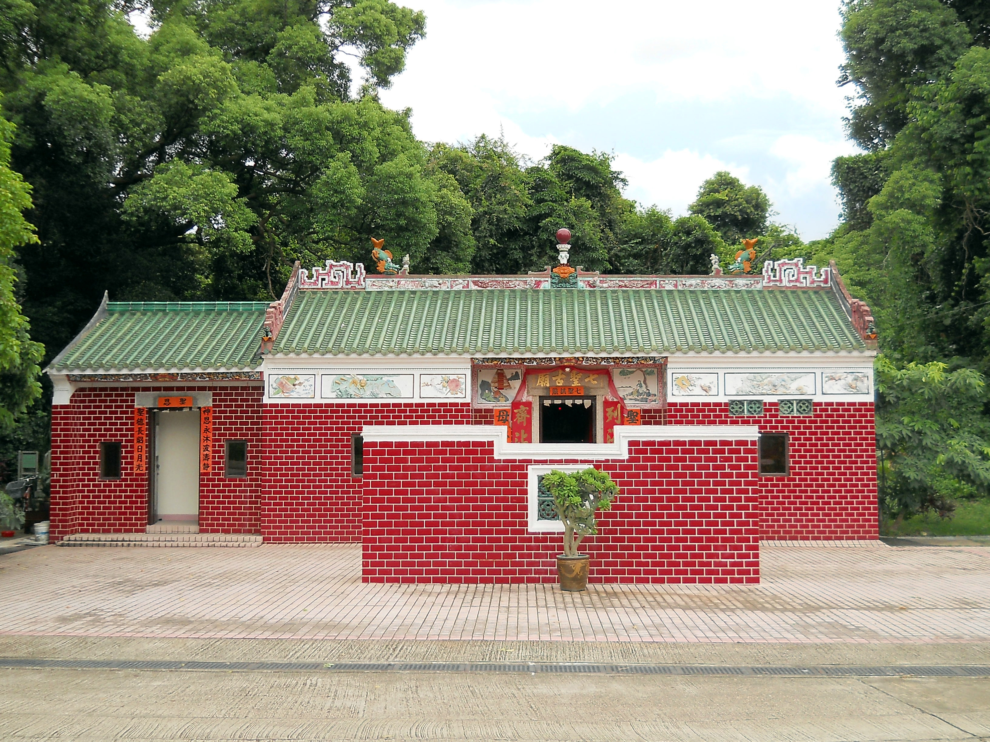 中文（香港）: 七聖古廟